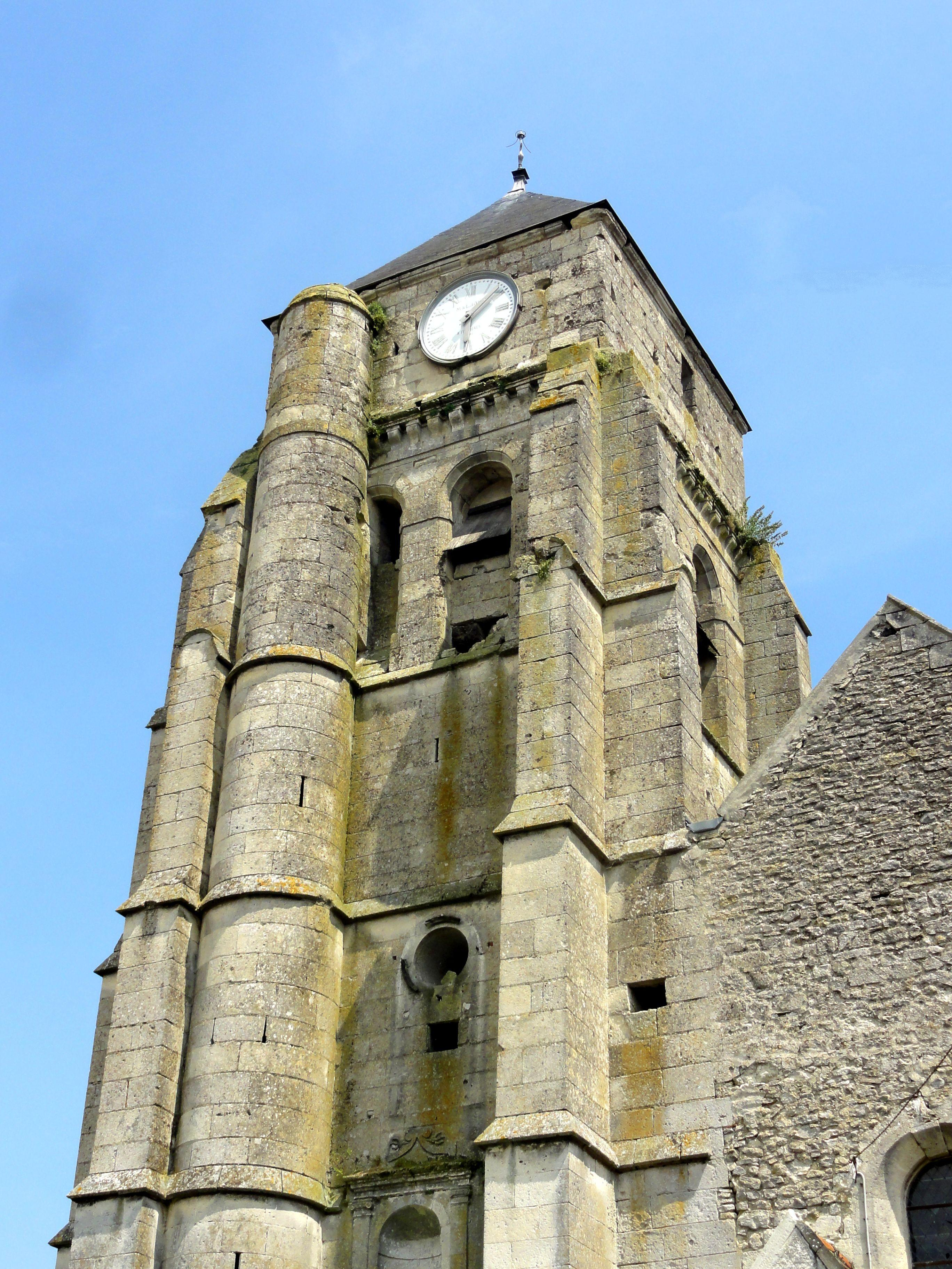 Clocher, côté ouest.